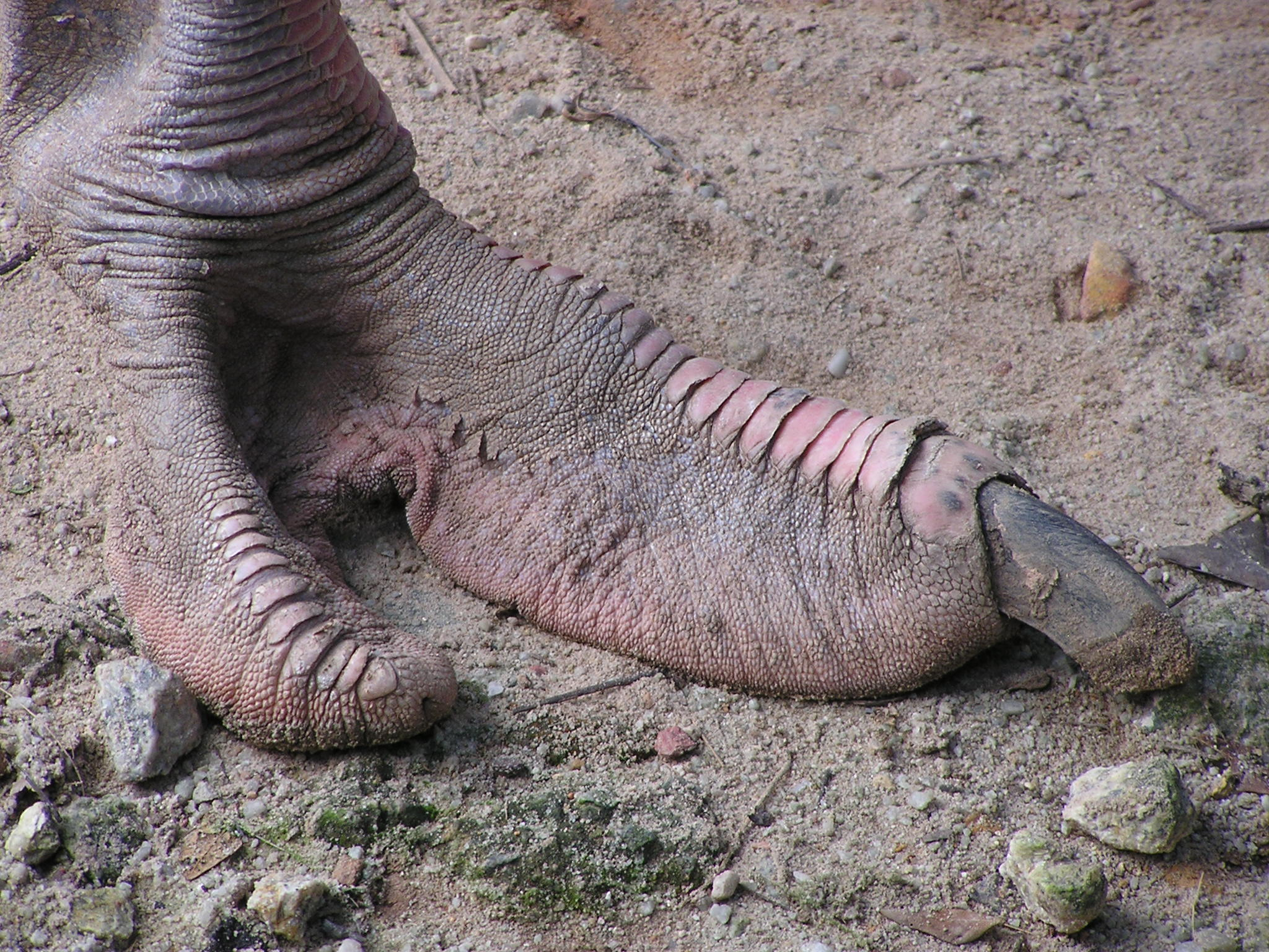 Straußenfuß